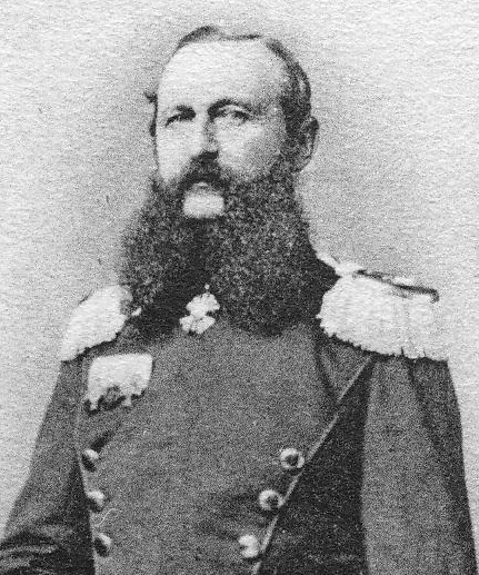 Kommandeur Ulanen-Regiment "Großherzog Friedrich von Baden" (Rheinisches) Nr. 7